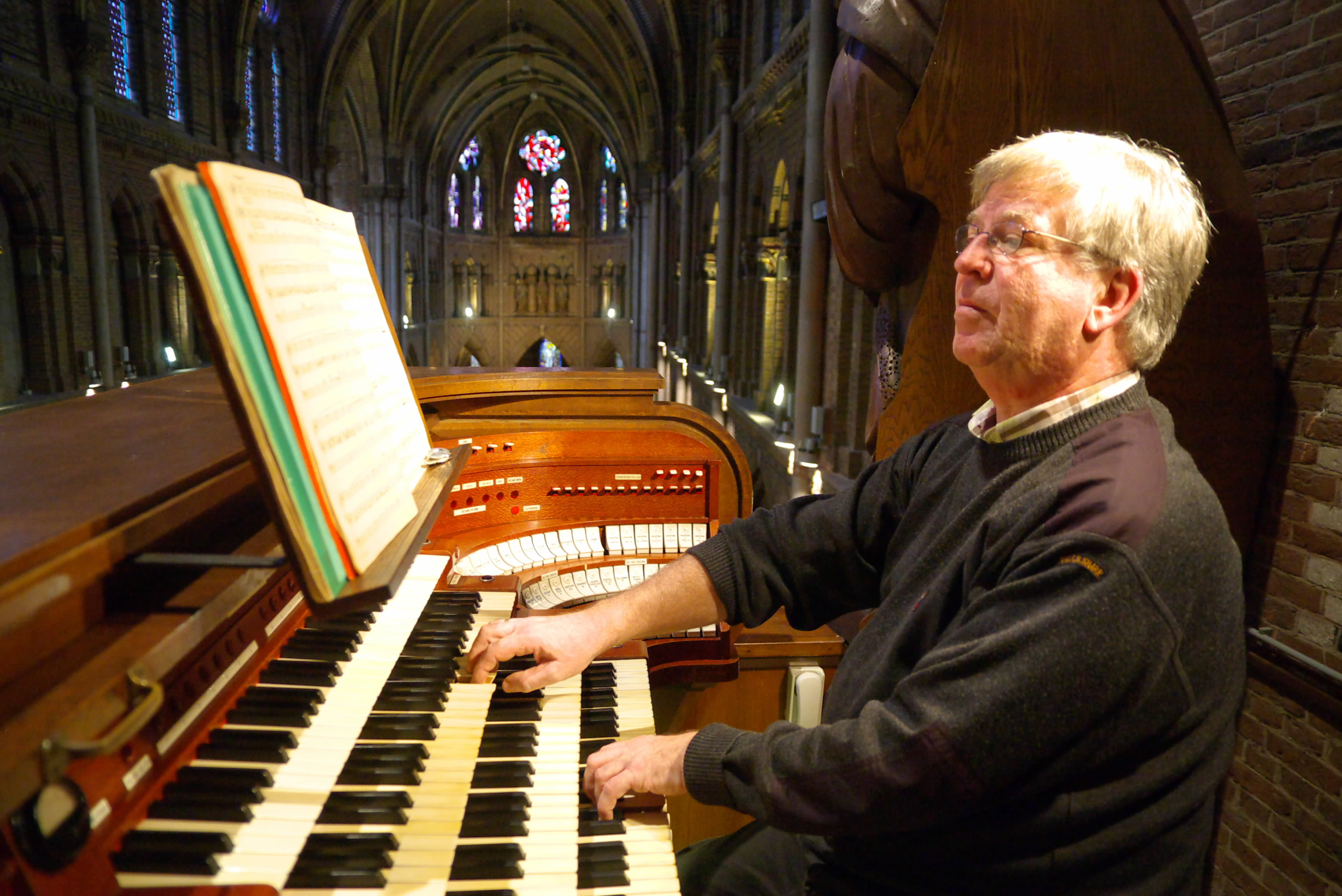 Bram Beekman op het orgel van de Catharinakerk te Eindhoven